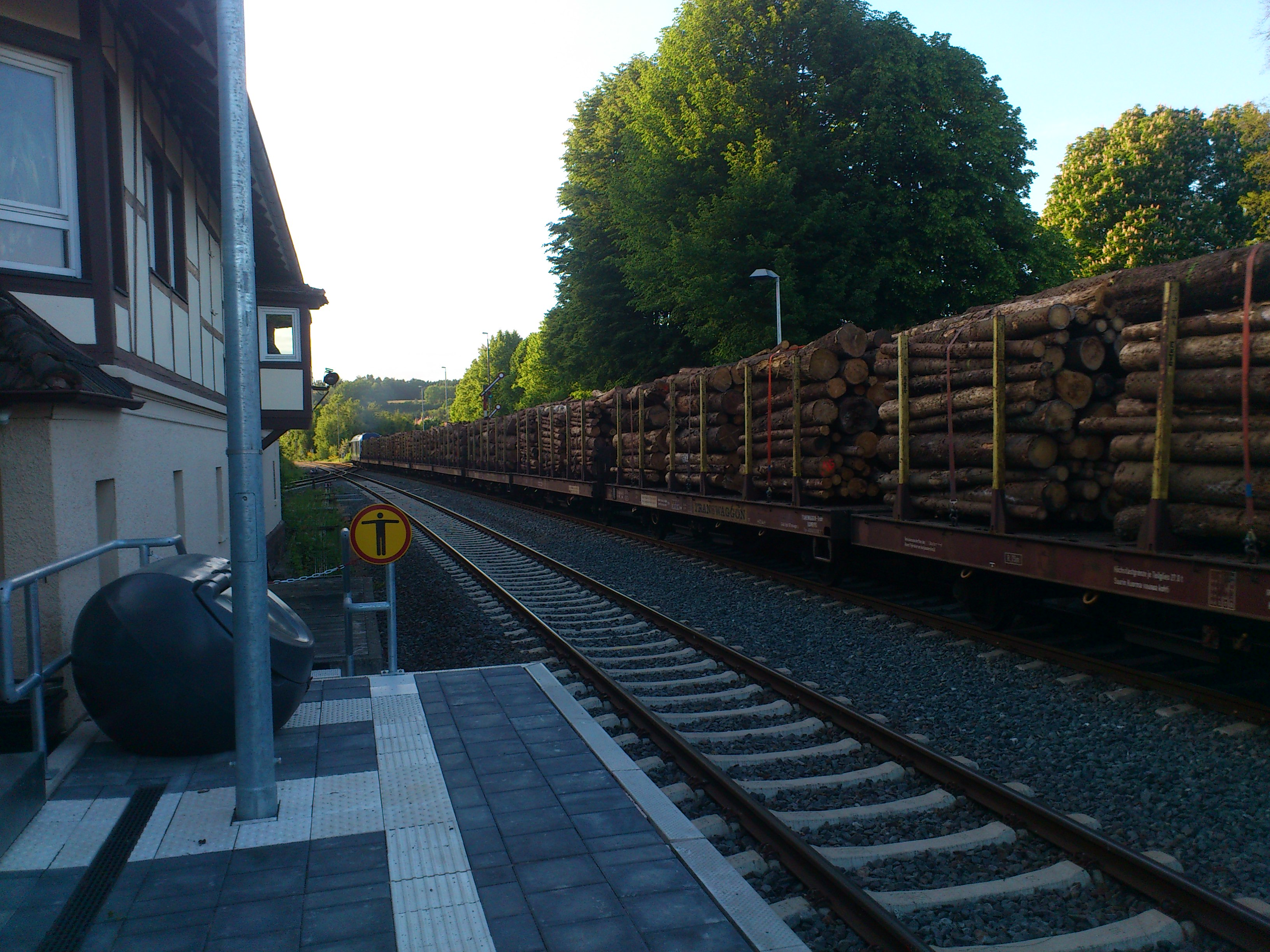 Bahnhof Herzberg (Harz): Blick vom Inselbahnsteig (Gleise 2 & 4) in Richtung Norden (Fahrtrichtungen Northeim und Seesen) mit langem durchfahrendem Güterzug, welcher zuvor im Güterbahnhof Holz geladen hatte und nun in Richtung Northeim fährt.